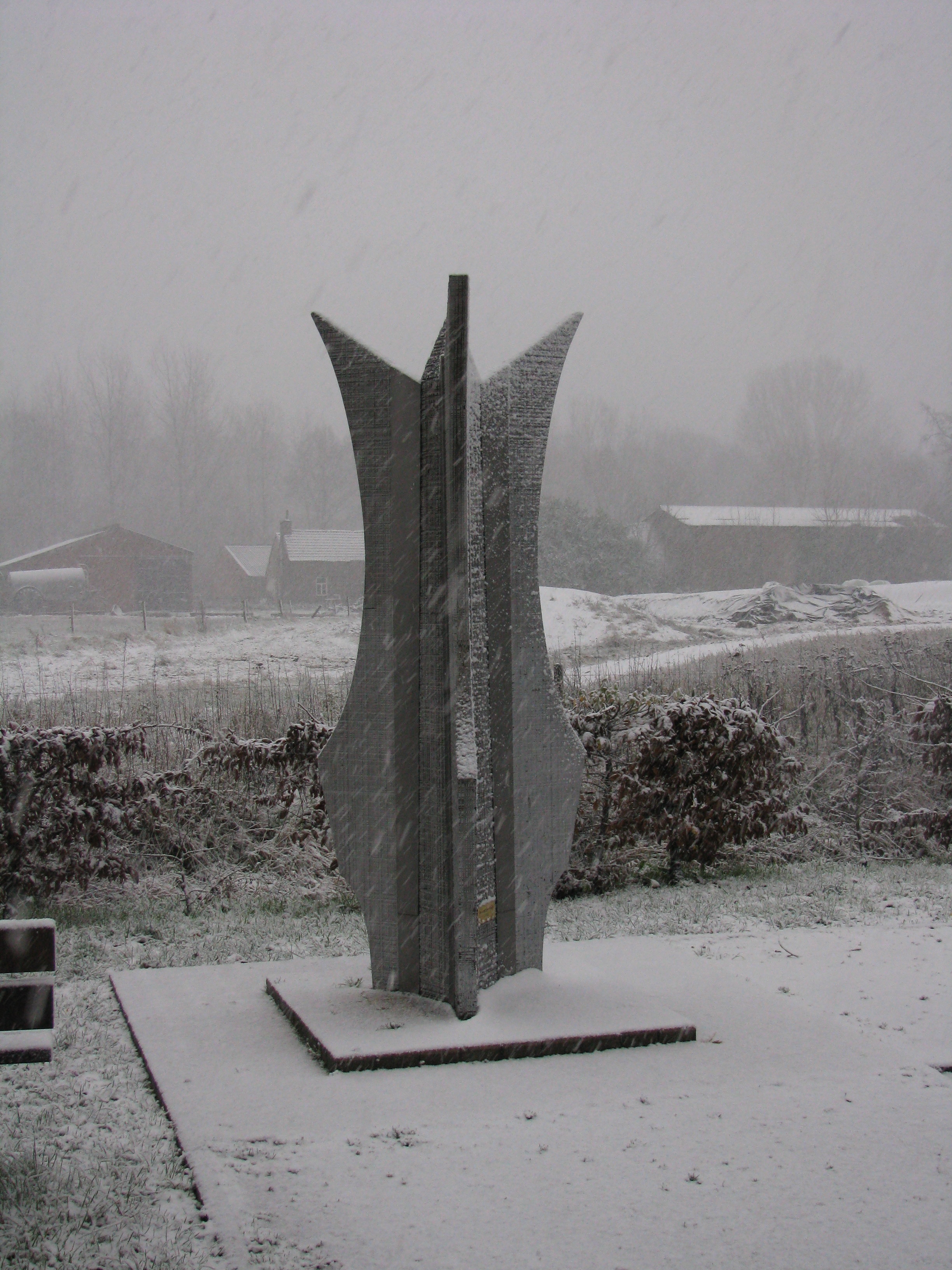 Geografisch middelpunt van Vlaanderen